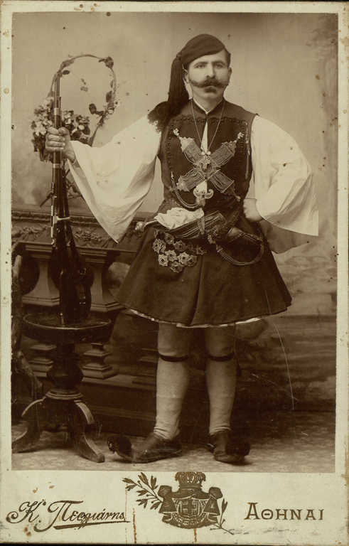 Томас Коровесис